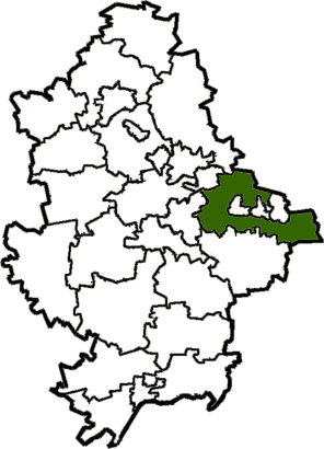 Shahtarskyi-Raion map